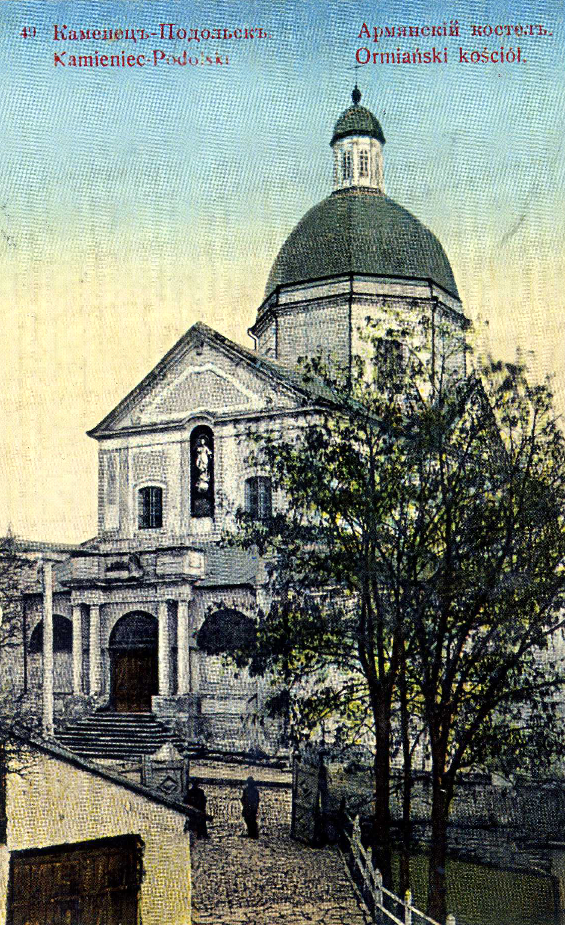 Вірменський костел Святого Миколи у Кам`янці на Поділлі.